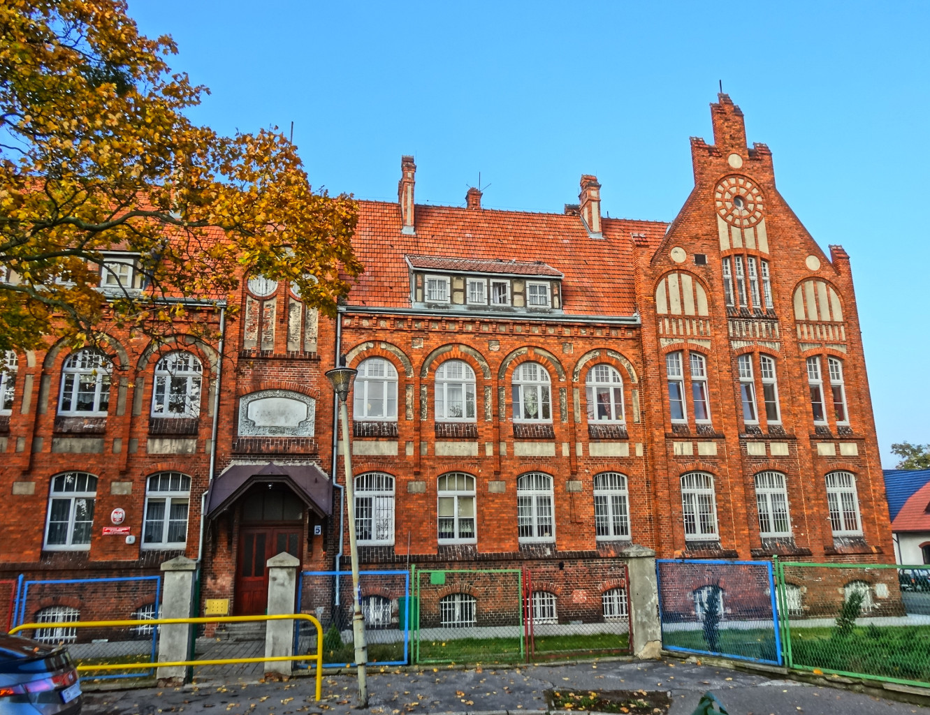 Bydgoski Zespół Placówek Opiekuńczo-Wychowawczych, ul. Traugutta 5 (1905-07, Carl Meyer), dawniej sierociniec miejski fundacji Hermanna Dietza